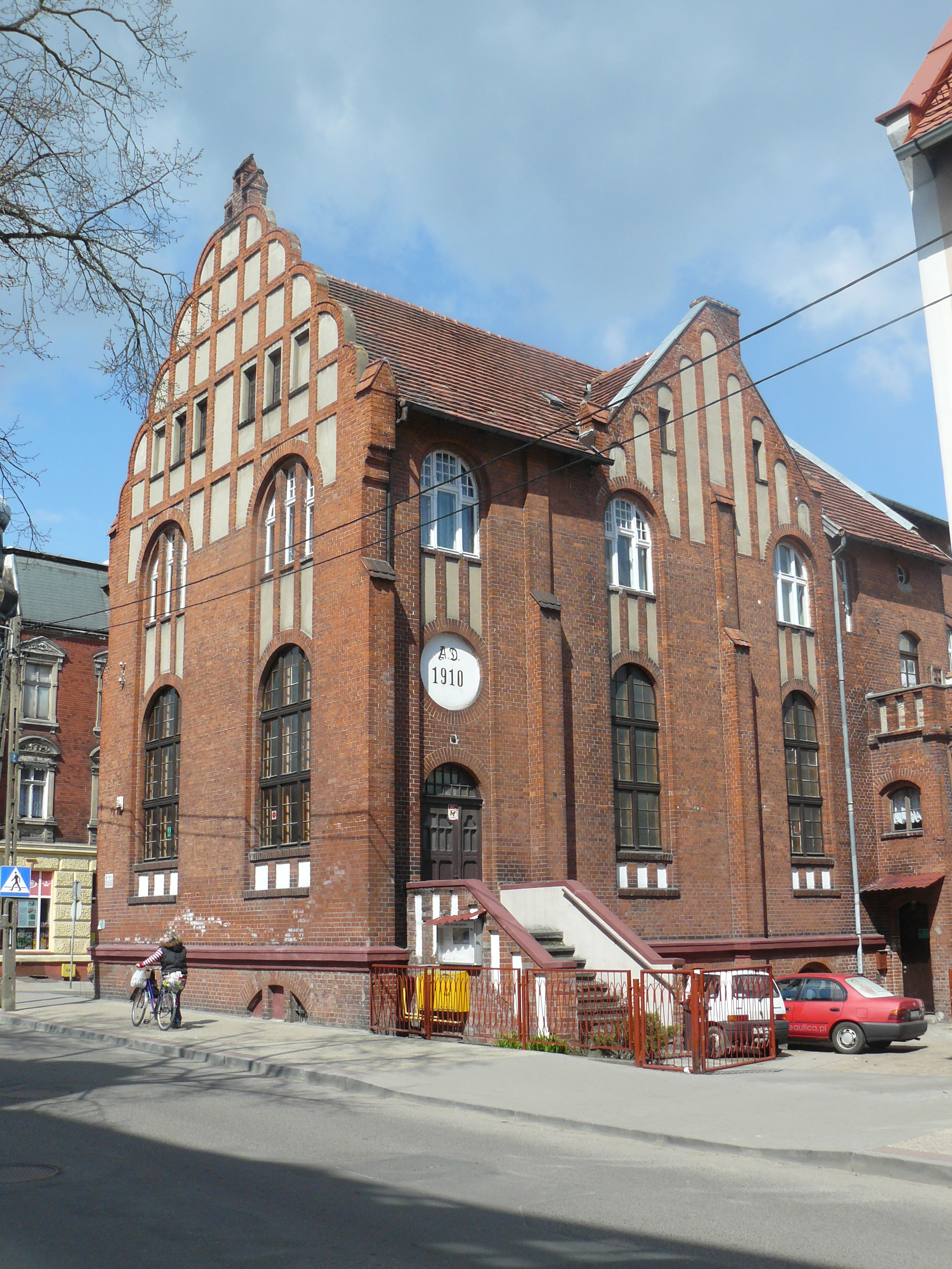 Malbork, ul. Jagiellońska 105 - kaplica kościoła Baptystów, 1910